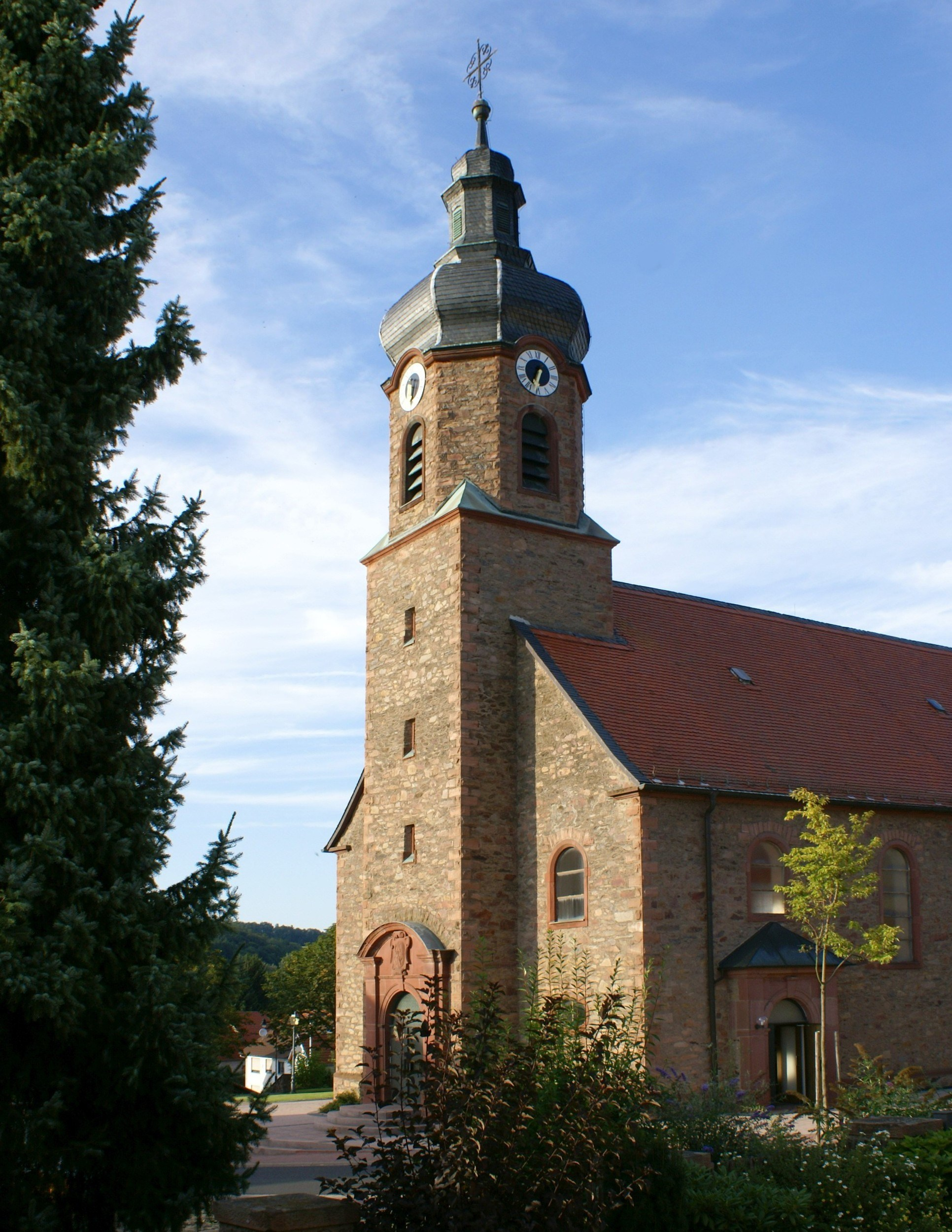 Blankenbach: Die imponierende Kirche St. Kilian und St. Bonifatius steht erhöht am Berghang und überragt einen großen Teil des Ortes